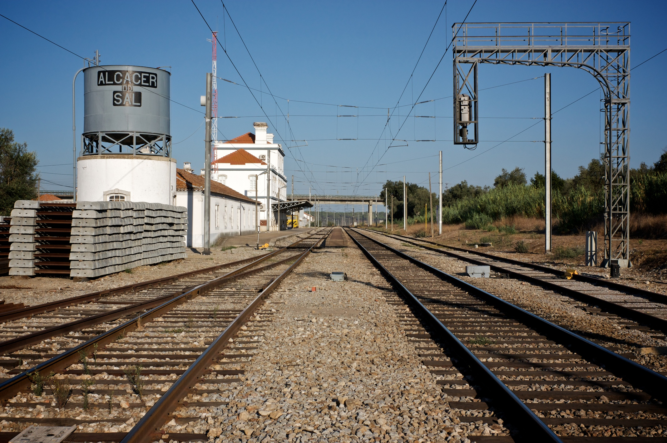 Tipo: EC [Estação de Concentração] Local: Alcácer do Sal [Linha do Sul, PK 78] Data e hora: 24 de Setembro de 2009 [08h52]